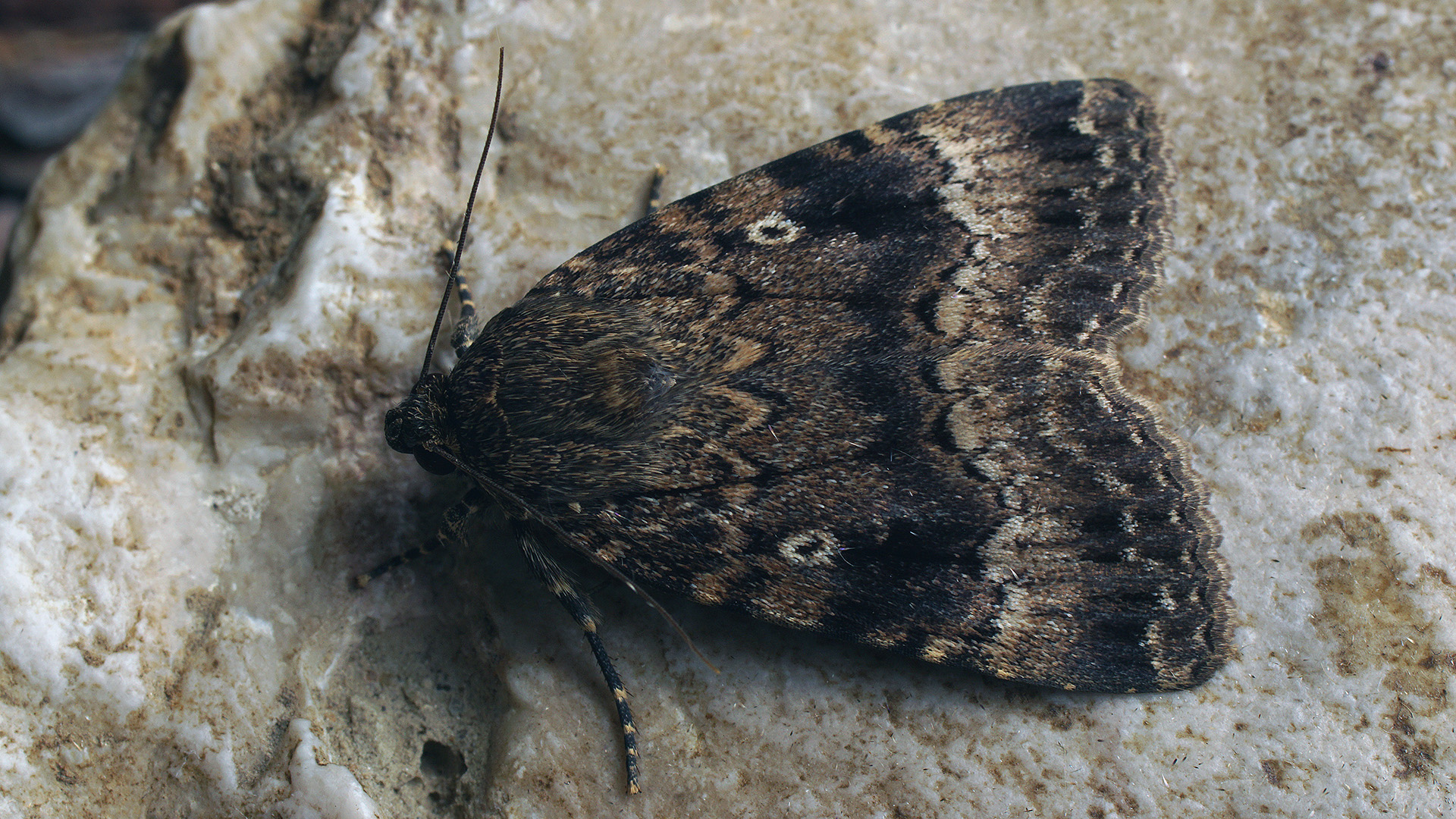 Exemplar found: Russia, Moscow Oblast, Odintsovsky District, near village Pestovo, 24.07.2019, by light МО, Одинцовский р-н, окрестности деревни Пестово, 24.07.2019, на свет